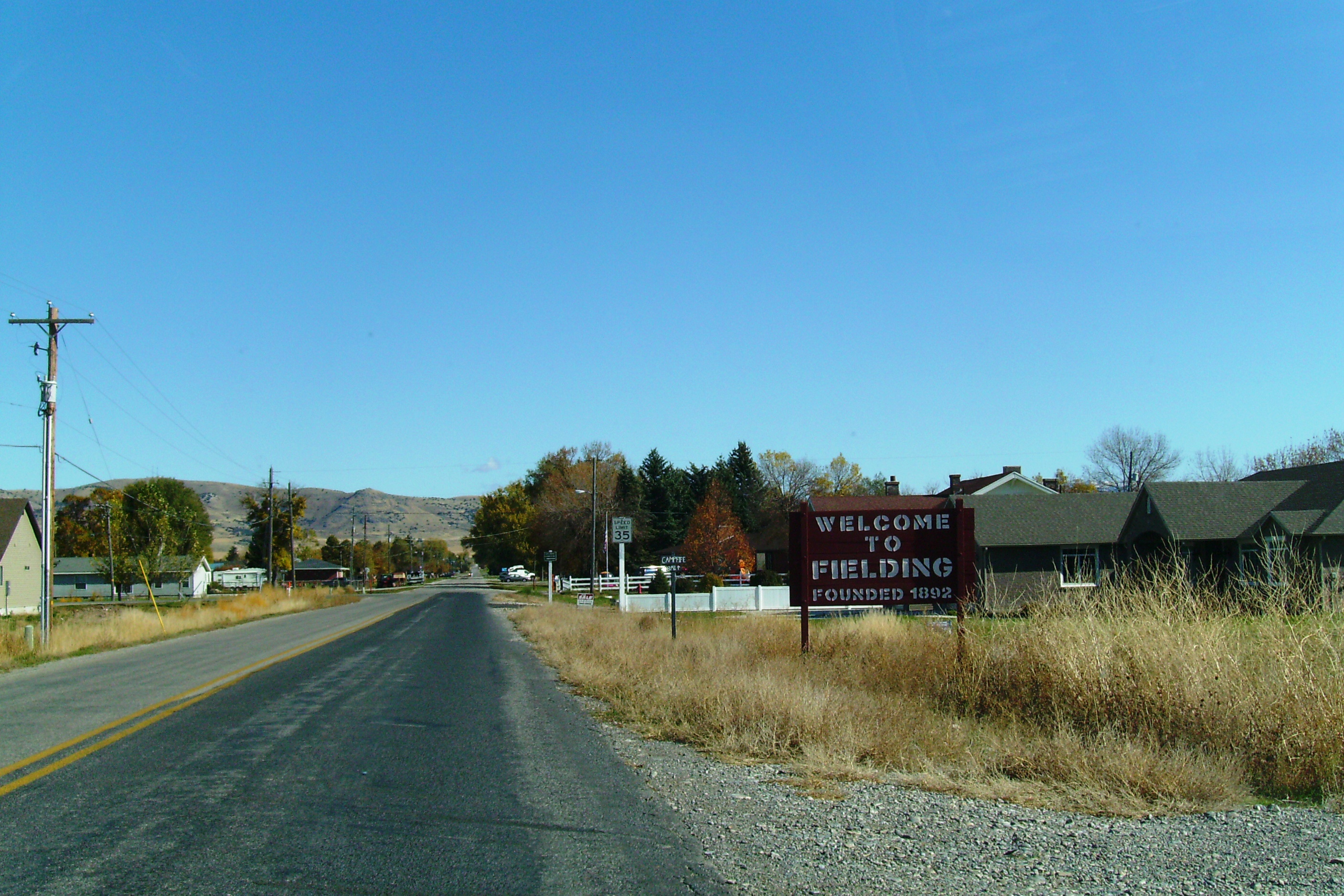 Fielding, Utah in Box Elder County